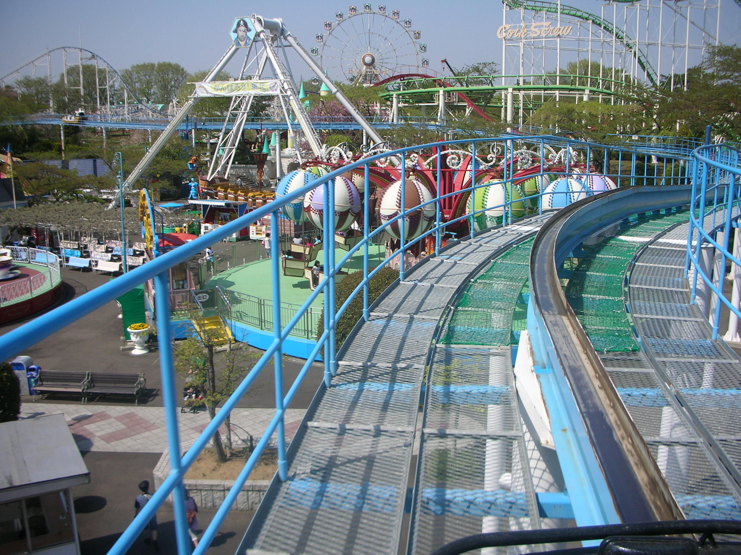 ベニーランド園内